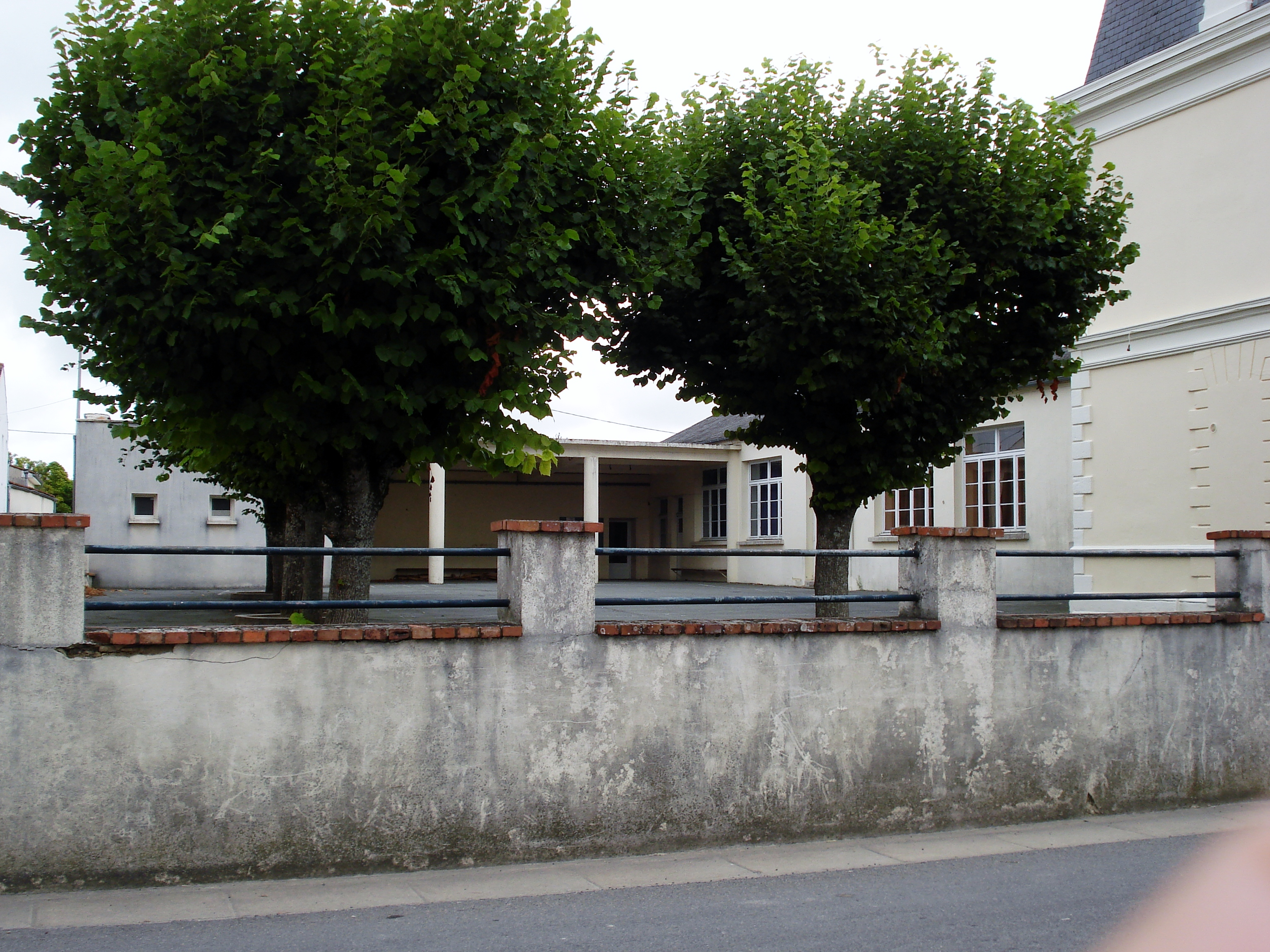 Ancienne école de Néré en Charente-Maritime